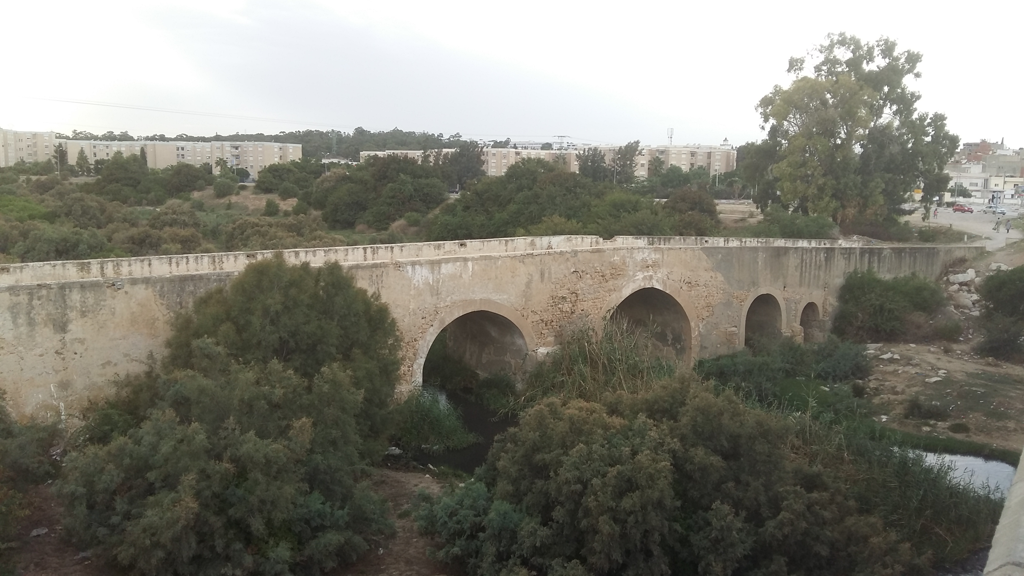 Pont archéologique de Oued Meliane